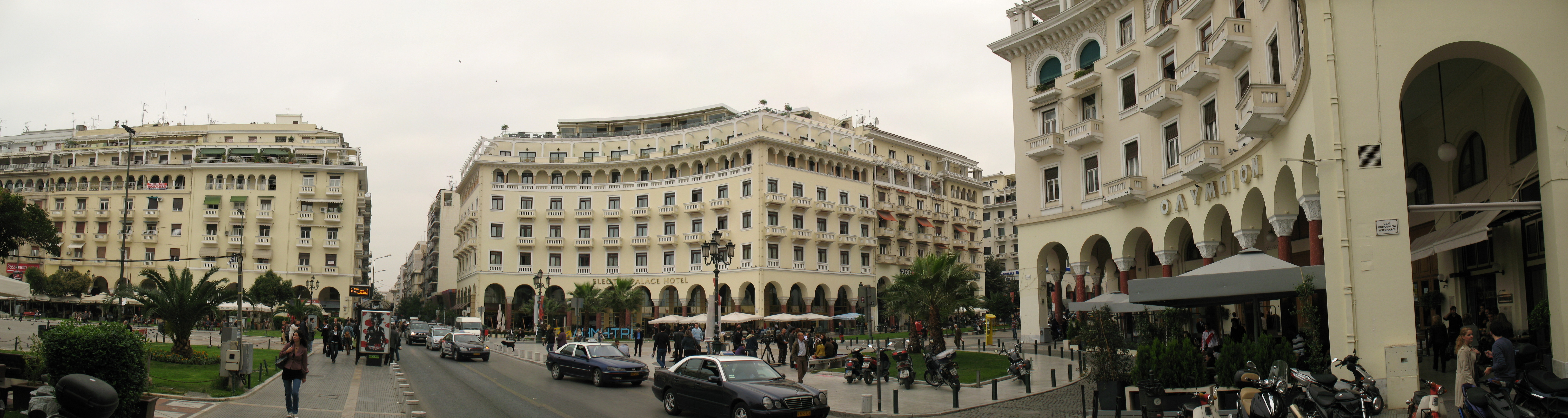 Thessaloniki (8'000x2'000px)